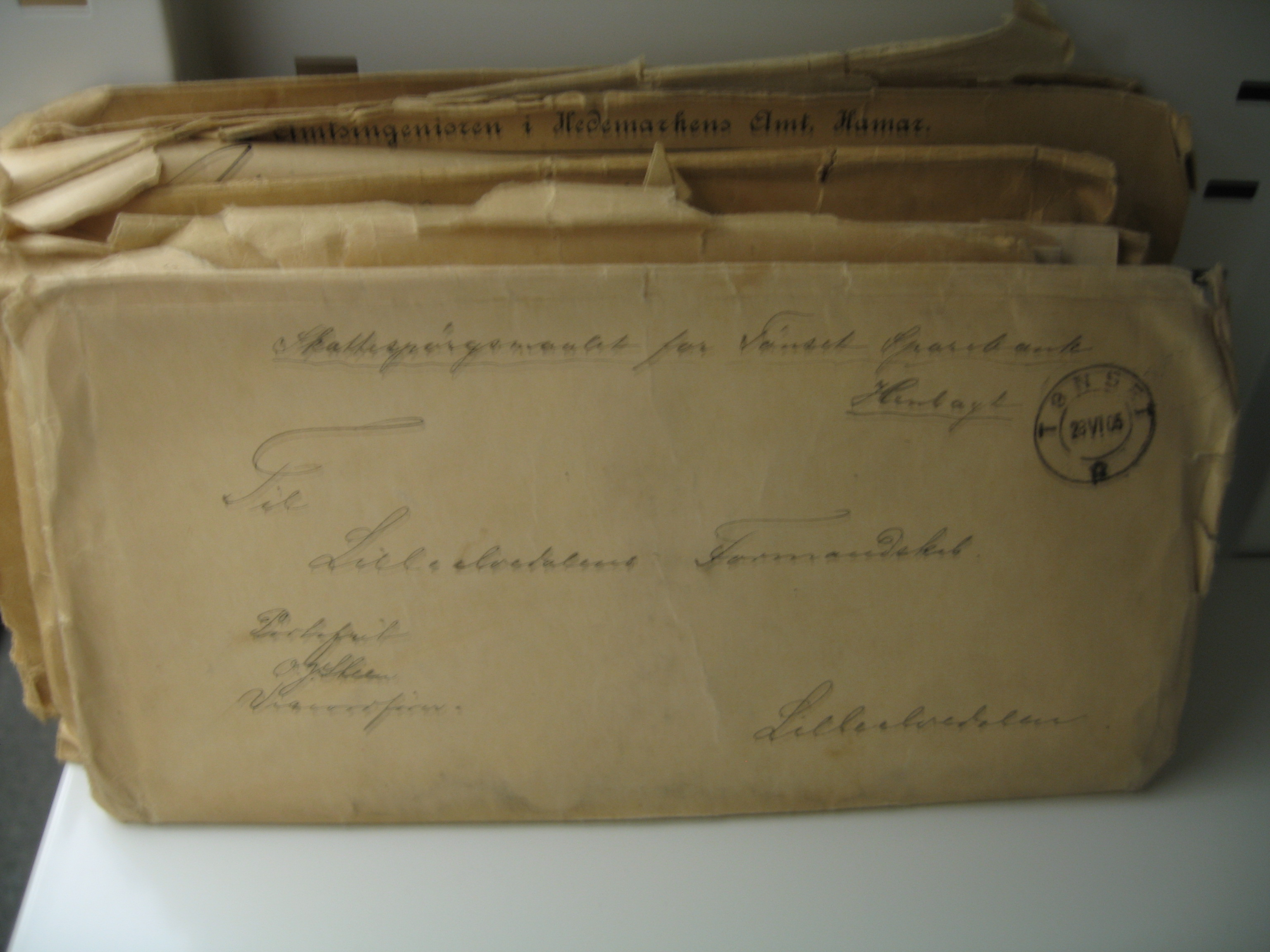 Arkivmateriale